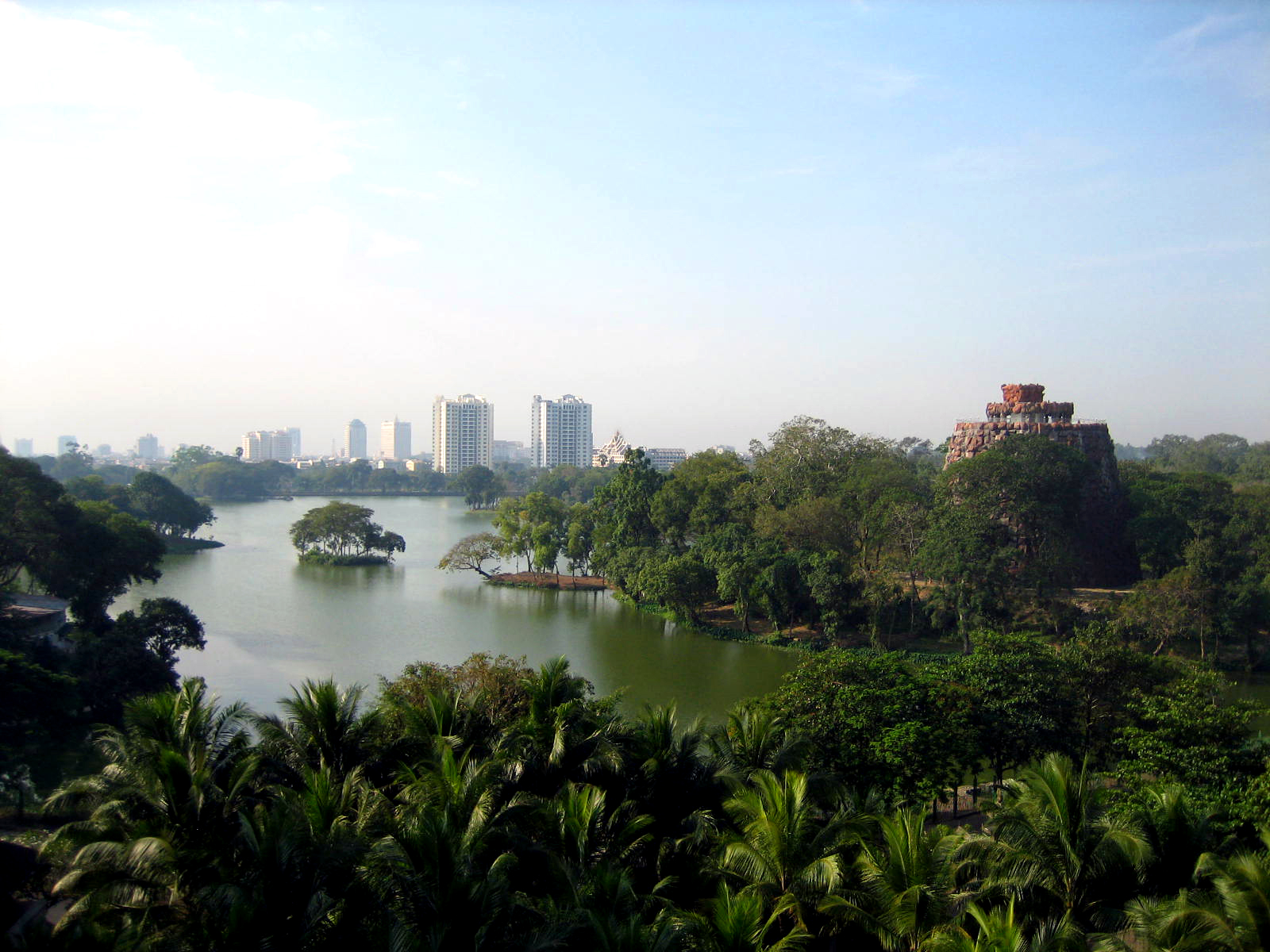 Kandawgyi Lake, Yangon, Myanmar